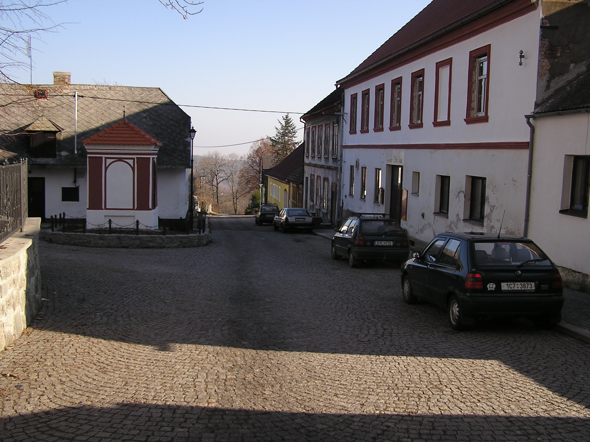 Ulice Starka ve VAcově